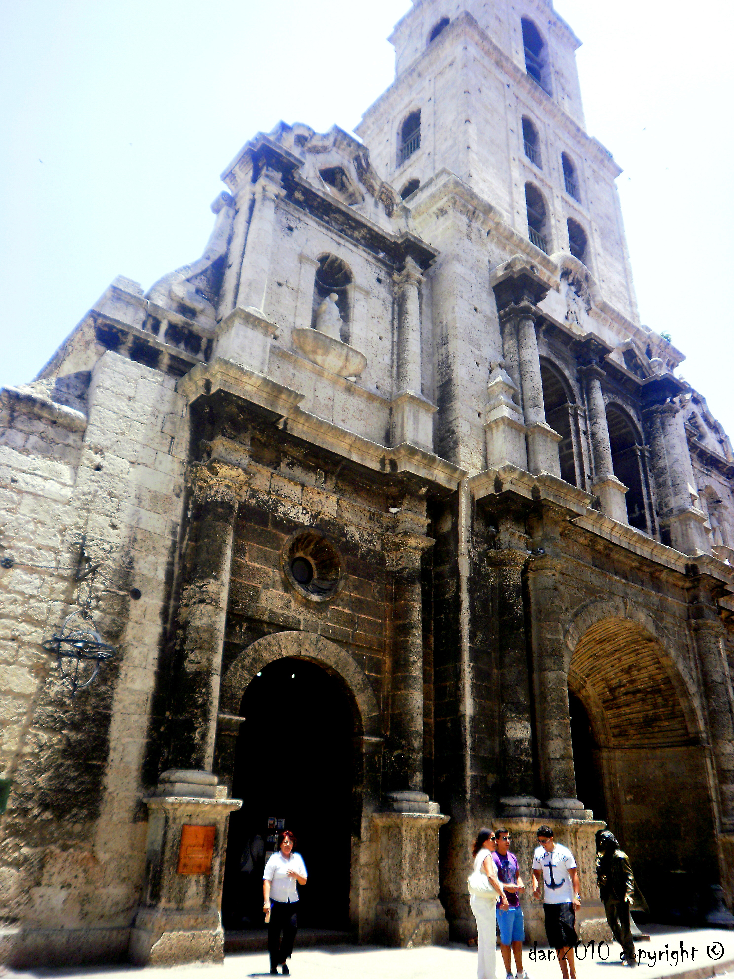 La Iglesia-Convento de San Francisco se eleva ante nosotros